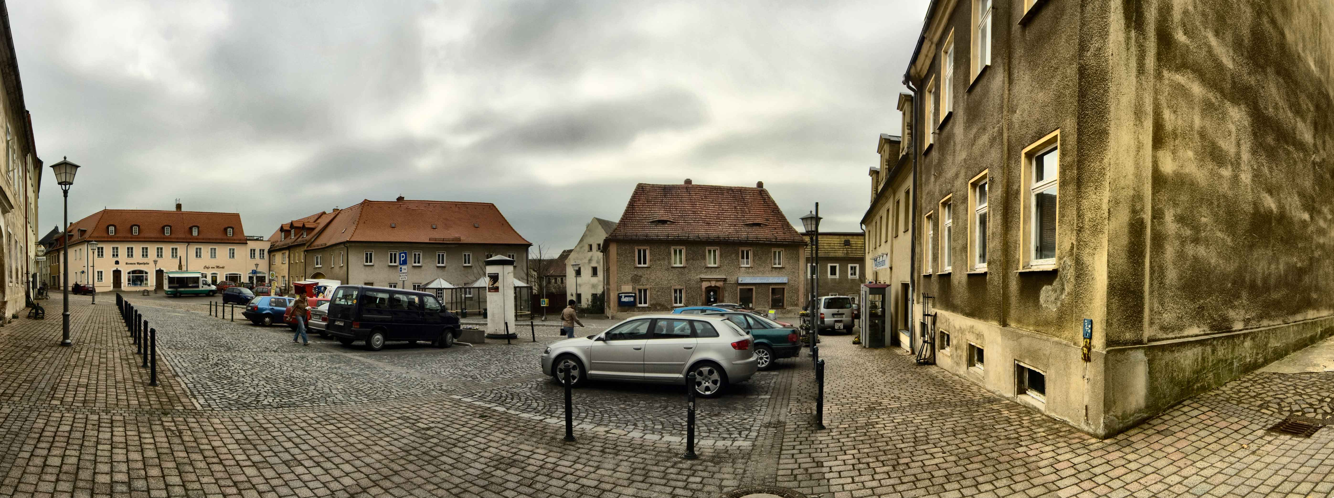 Der Markt von Mutzschen in Sachsen